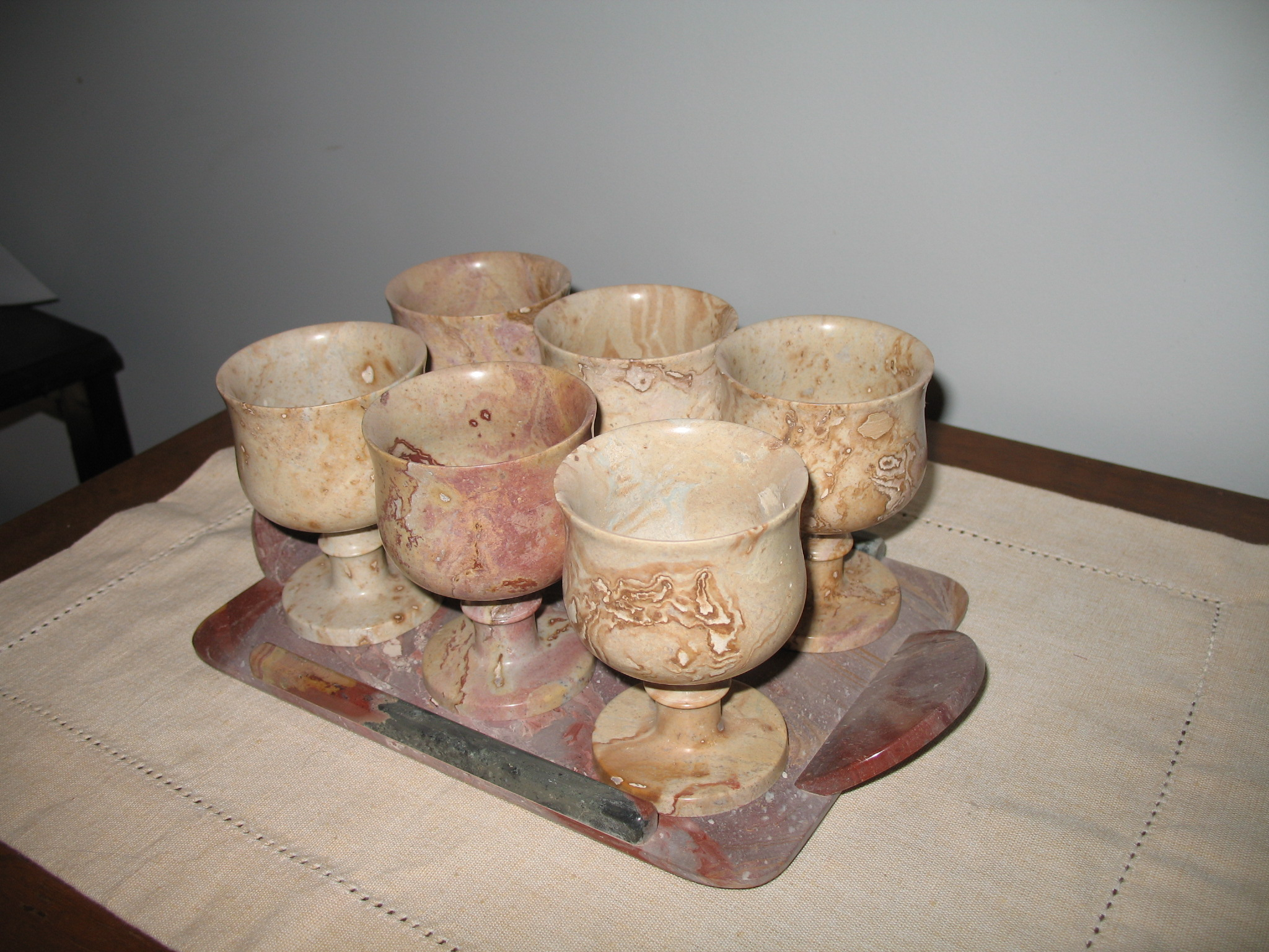 Copas. Artesanía en combarbalita comprada en Tongoy